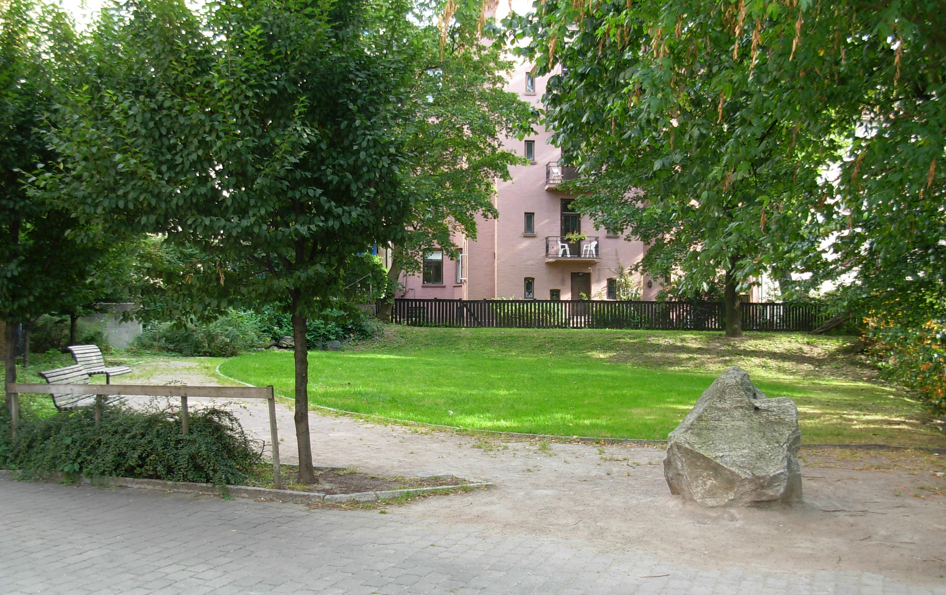 Dronning Astrids park, Hegdehaugen, Oslo